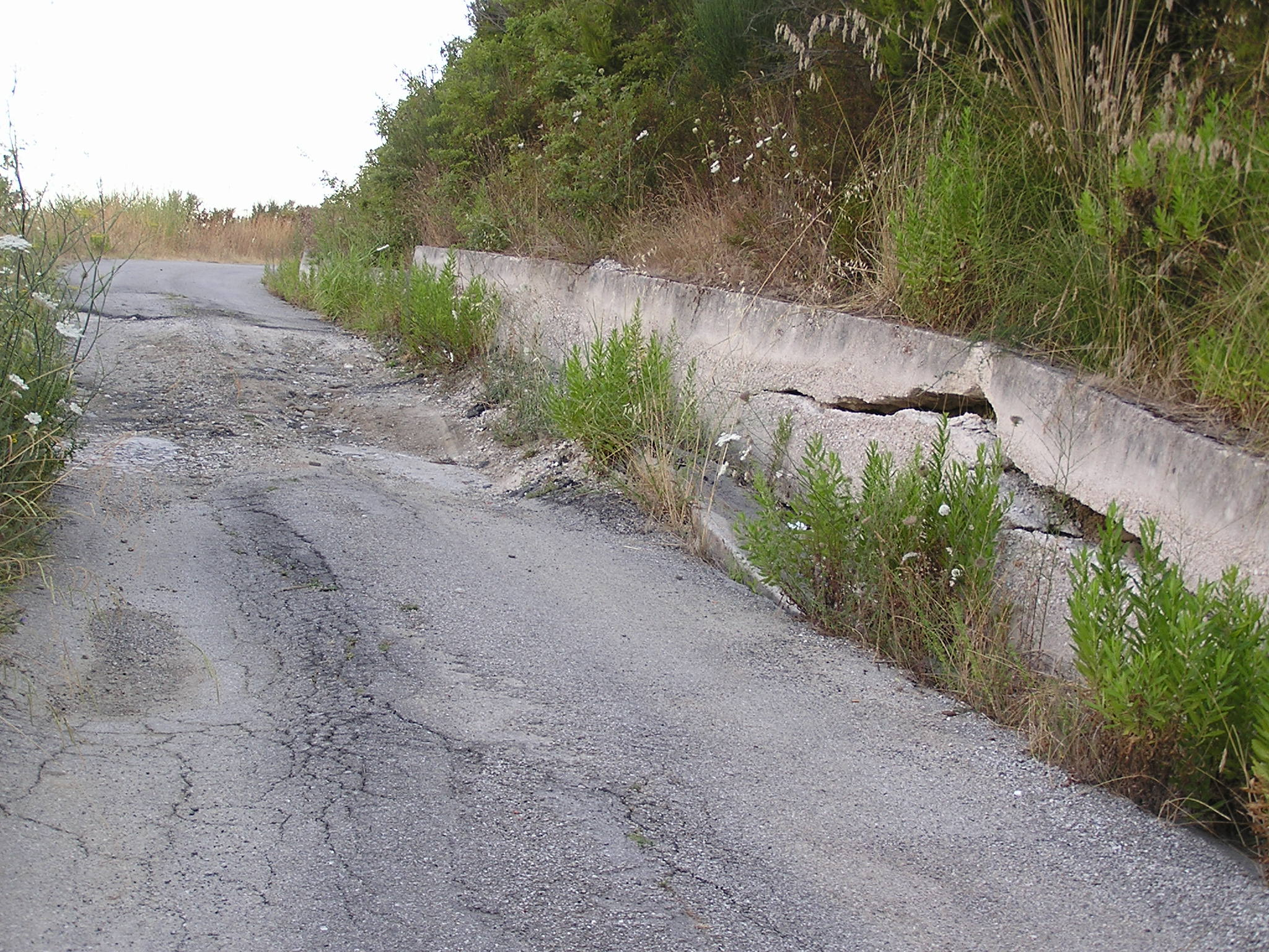 Una strada di campagna dissestata, con il muro lesionato dalla frana.